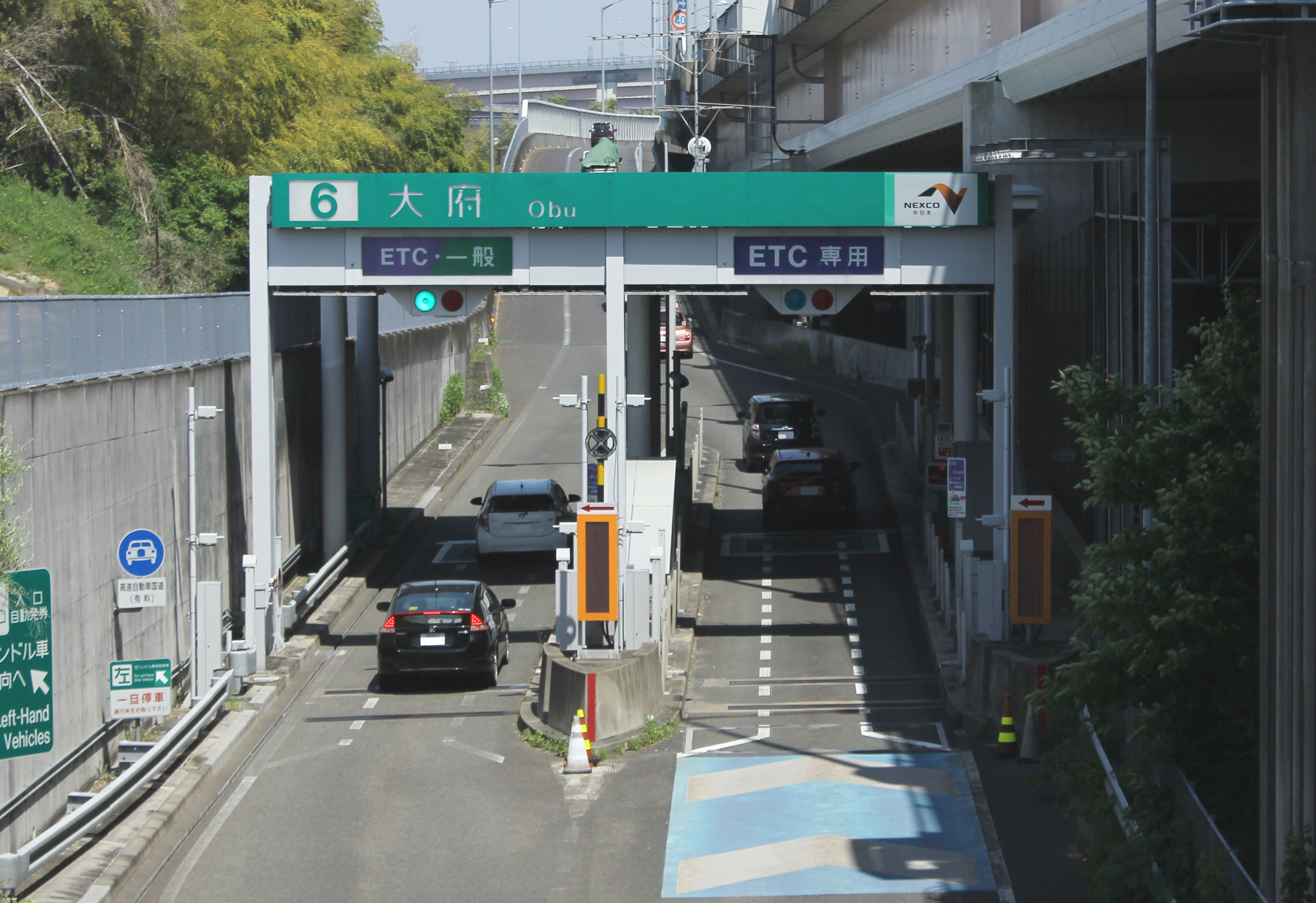 伊勢湾岸自動車道（第二東名）大府インターチェンジ（豊田方面）トールゲート